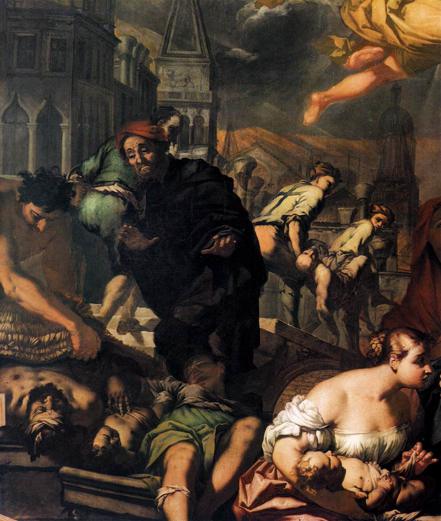 detail